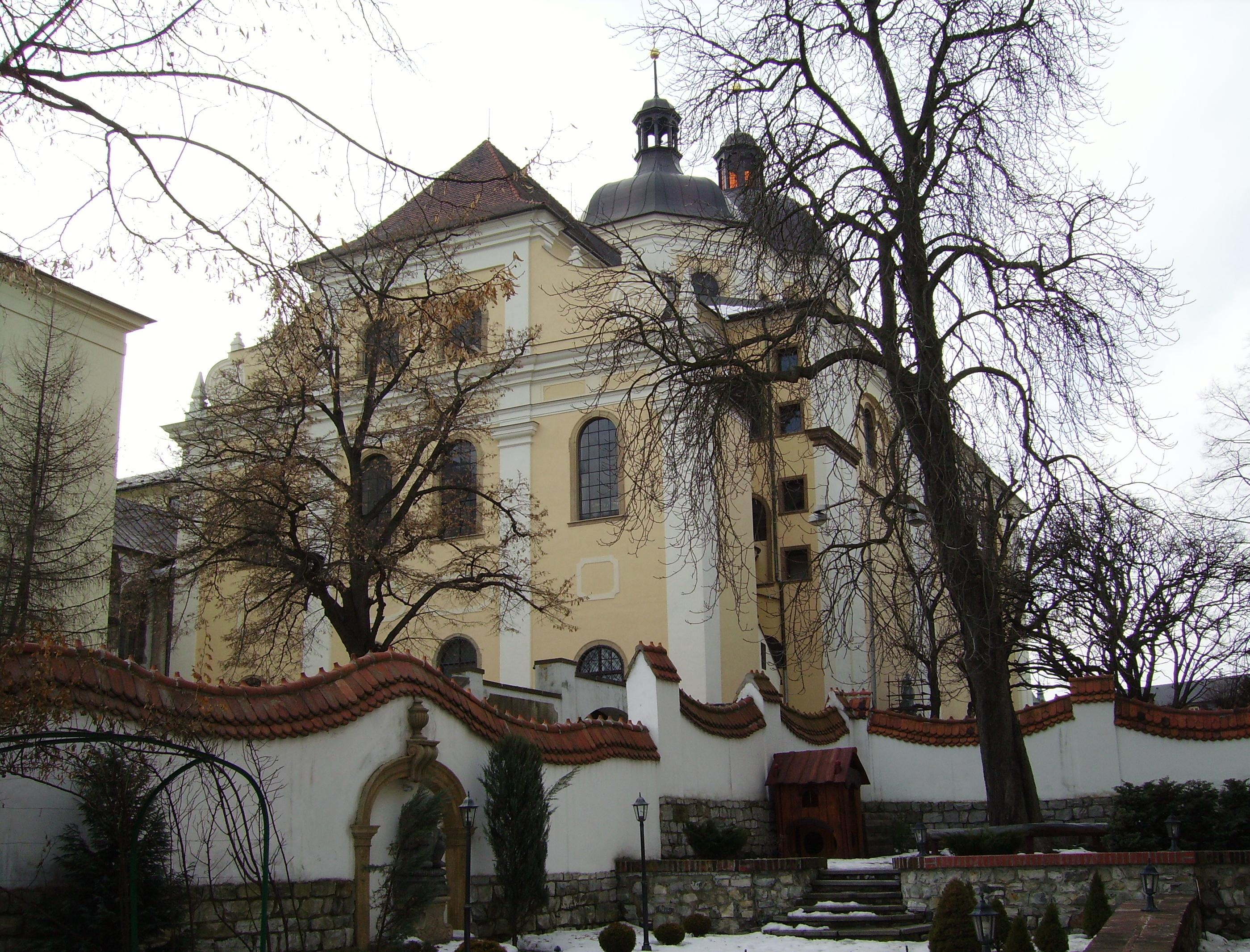 Česky: Kostel svatého Michala v Olomouci; pohled na zadní trakt ze zahrady Vily Primavesi